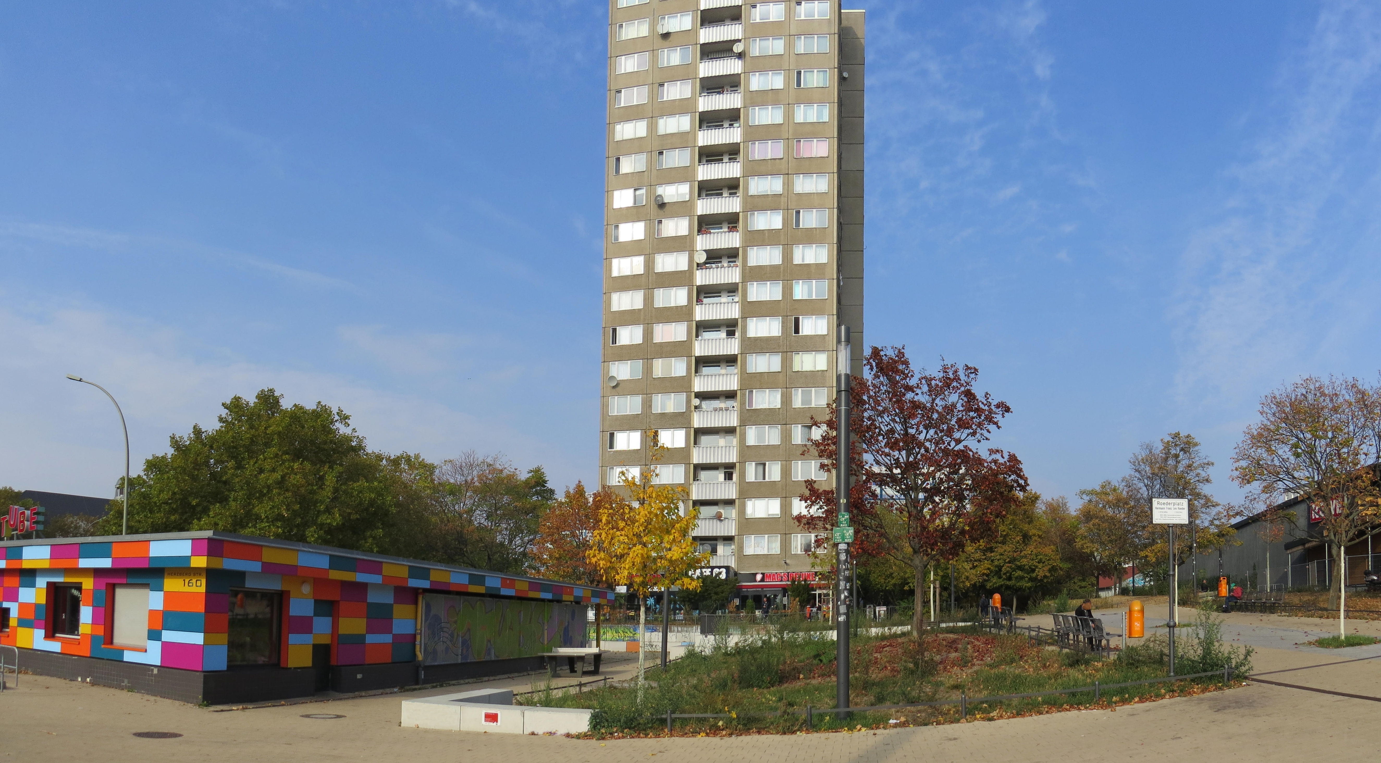 Roederplatz